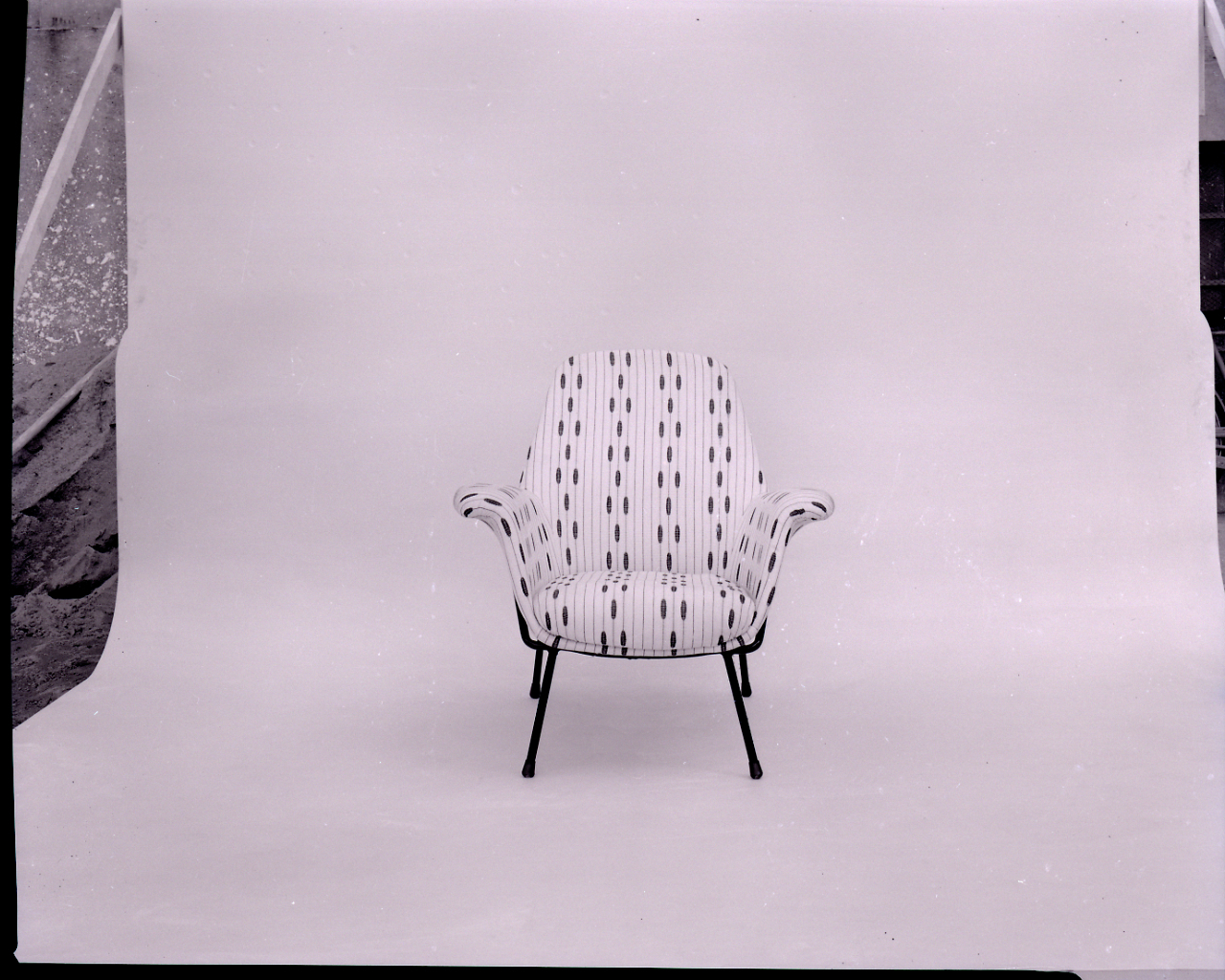 Poltrona Martingala disegnata da Marco Zanuso, 1954. Servizio fotografico : Milano, 1975 / Paolo Monti. - Buste: 4, Fototipi: 4 : Negativo b/n, gelatina bromuro d'argento/ pellicola ; 10x12. - ((Serie costituita da 4 negativi identificati con i nn.: 5525-5528. Sulla busta G5525 manoscritto: "Ar-Flex". La suddetta serie è contenuta nella scatola identificata con la numerazione G5392-5557. Sul coperchio della scatola manoscritto: "Ar-Flex". - Fonte: Rubrica di Paolo Monti: Archivio 10x12 (ultimi numerati) - dal G1 al (s.d.), presso Archivio Paolo Monti